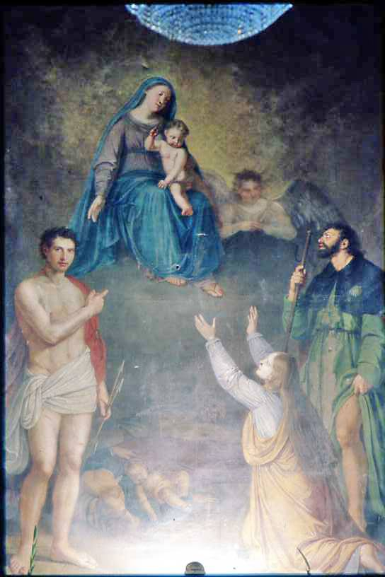 Dipinto nell'altare maggiore del Santuario della Madonna dei Miracoli, Alcamo. È raffigurata la Madonna dei miracoli (patrona della città di Alcamo) con i santi Rocco, Sebastiano e Rosalia (compatroni della città di Alcamo) durante la cessazione della peste del 1575. La tela è opera di Giuseppe Patania (1828).